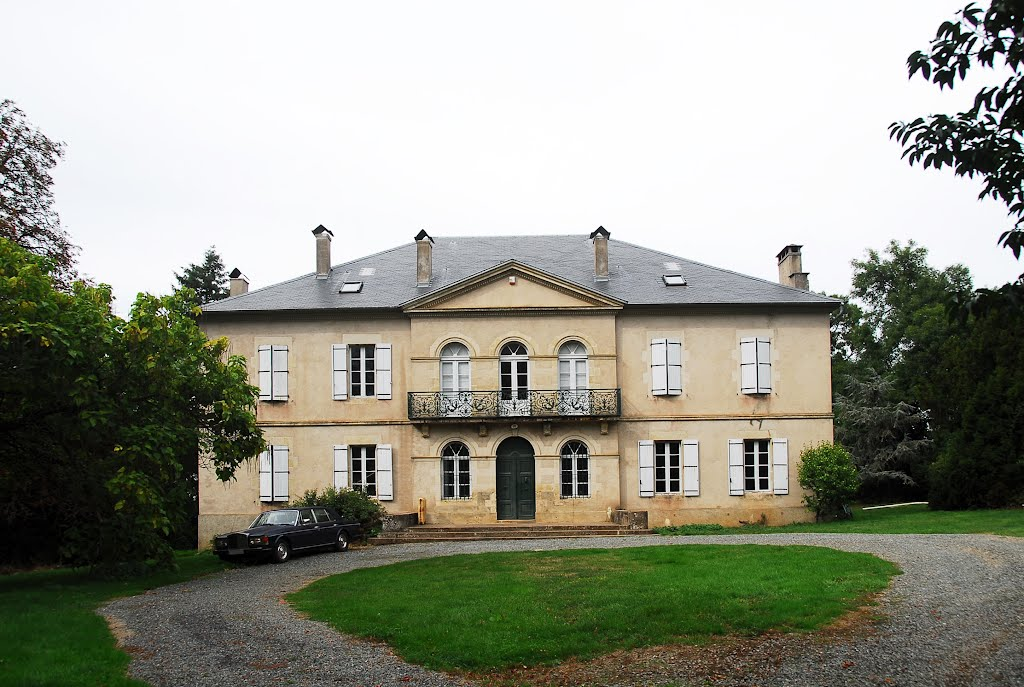 Château de l'Algairié, sur la commune de Teillet (81)